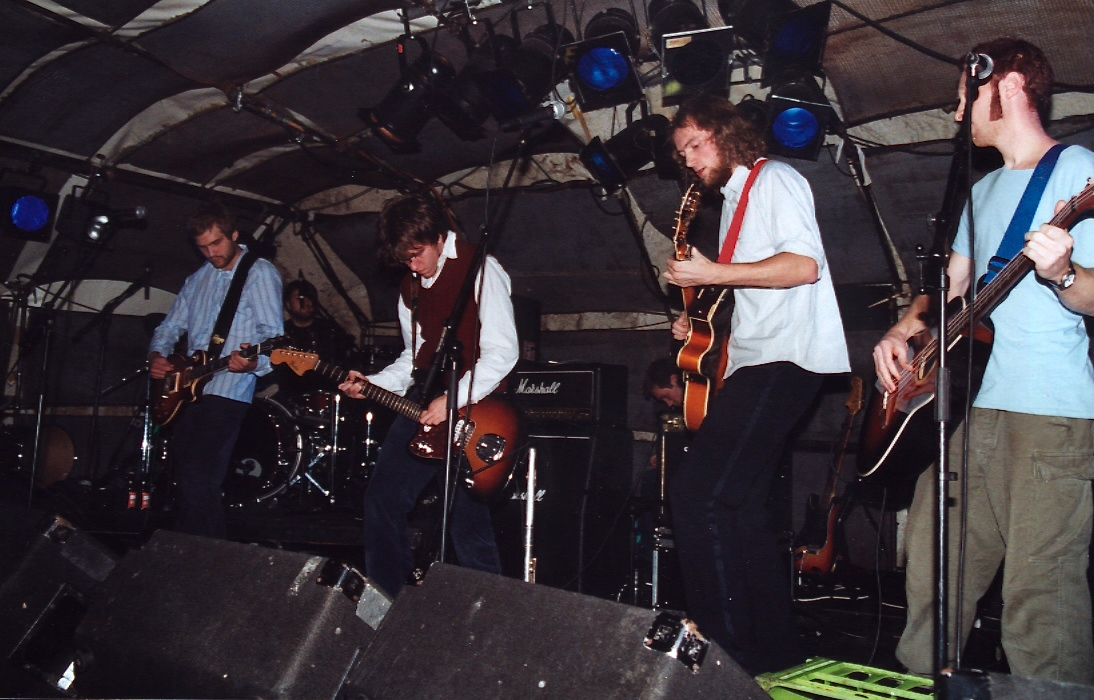 Emily Lang under konsert på Hulen i Bergen